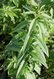 ajout de contenu